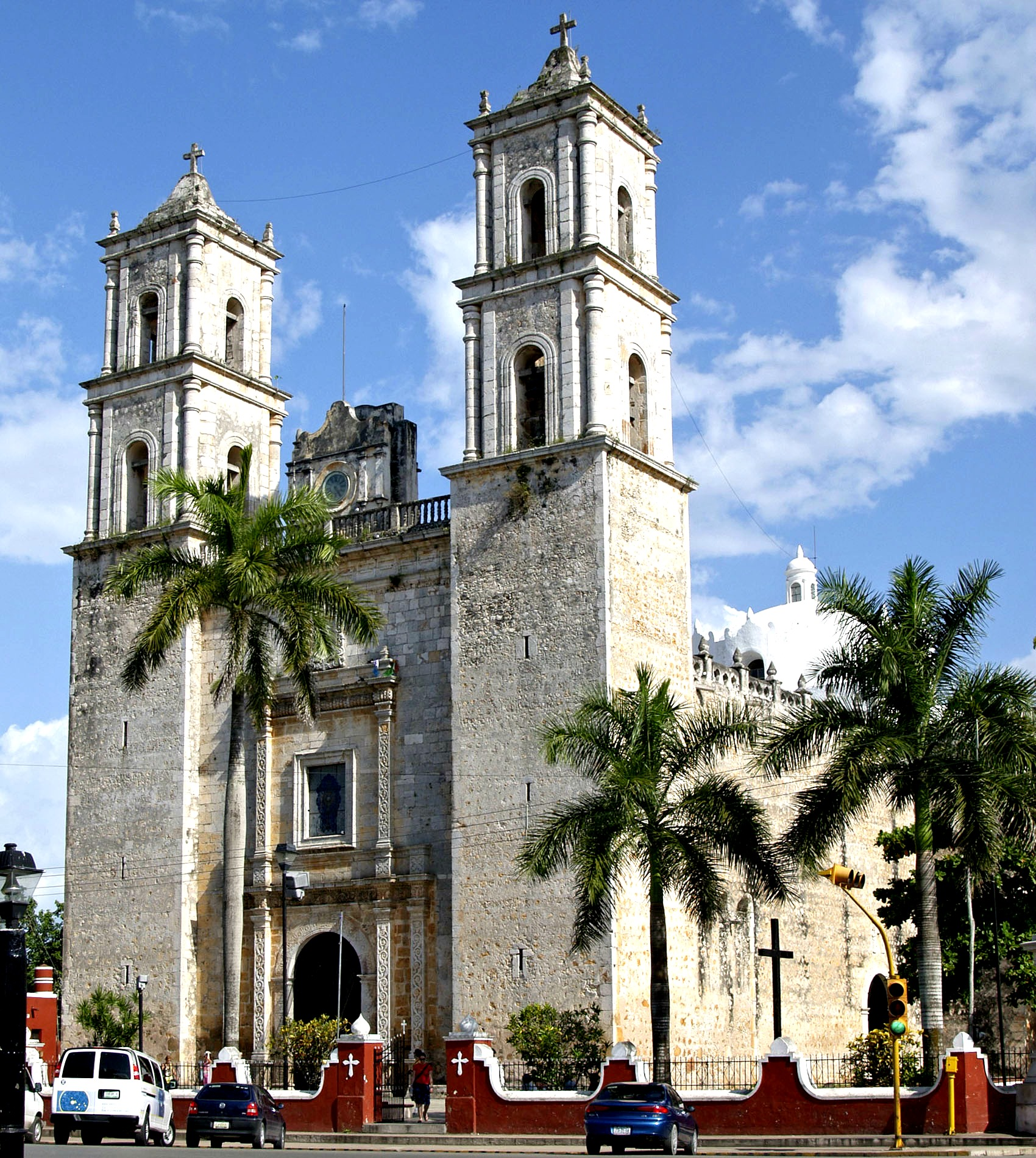 Iglesia parroquial de San Gervasio, Valladolid (Yucatán, México)